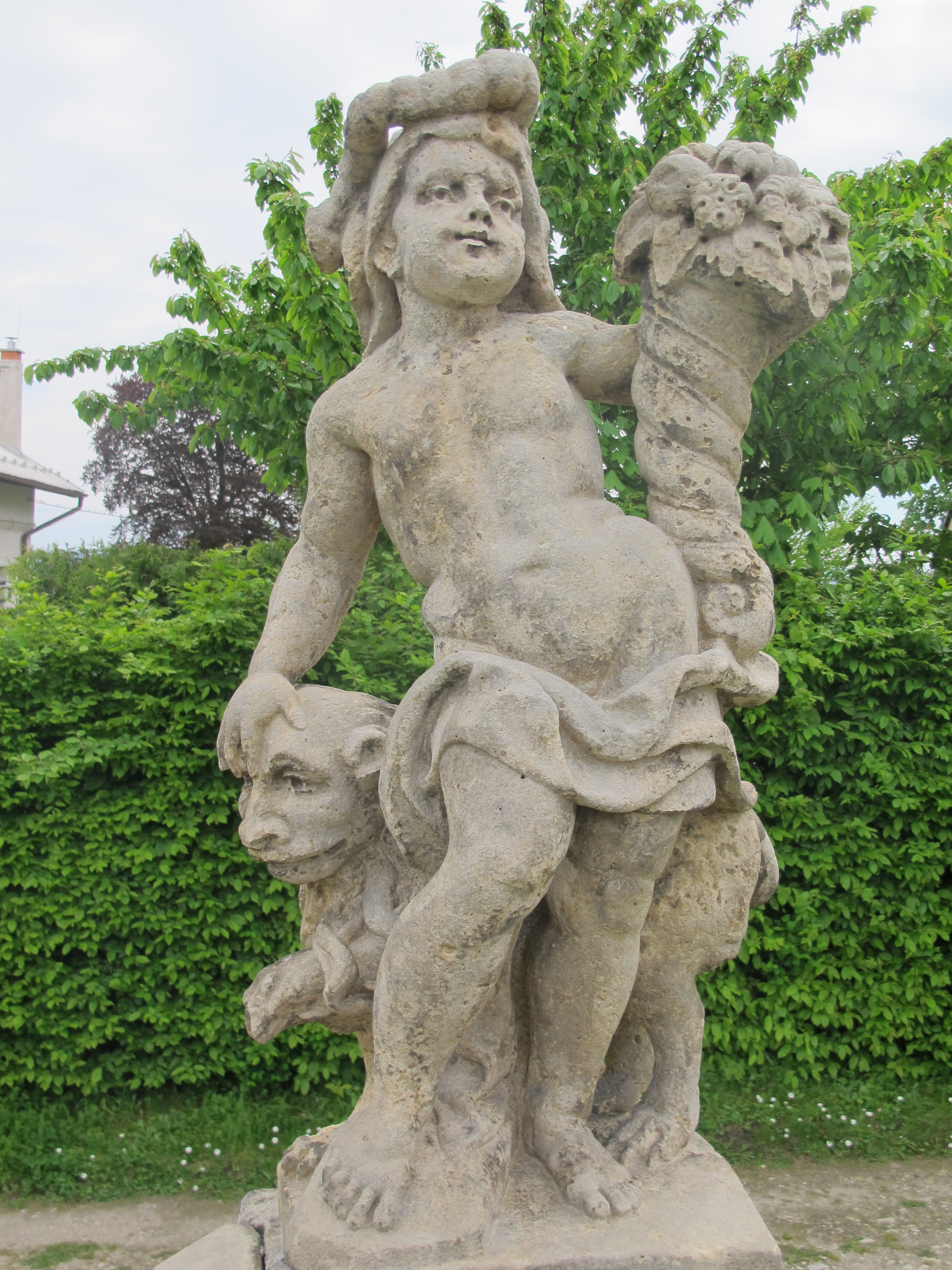 Alegorická socha Afrika. Zámek Lysá nad Labem, Zámecká 1/21, Lysá nad Labem